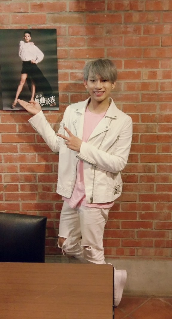 中文（台灣）: 嘻小瓜 嘻望愛生日演唱會2017/06/25